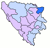 BosniaRegion Bijeljina